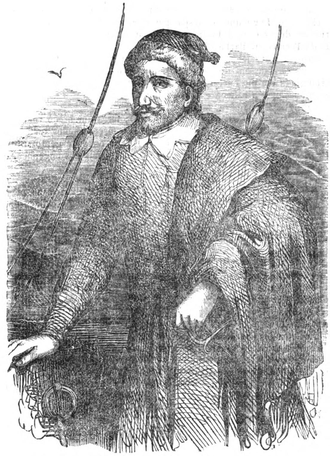 Barba-roxa